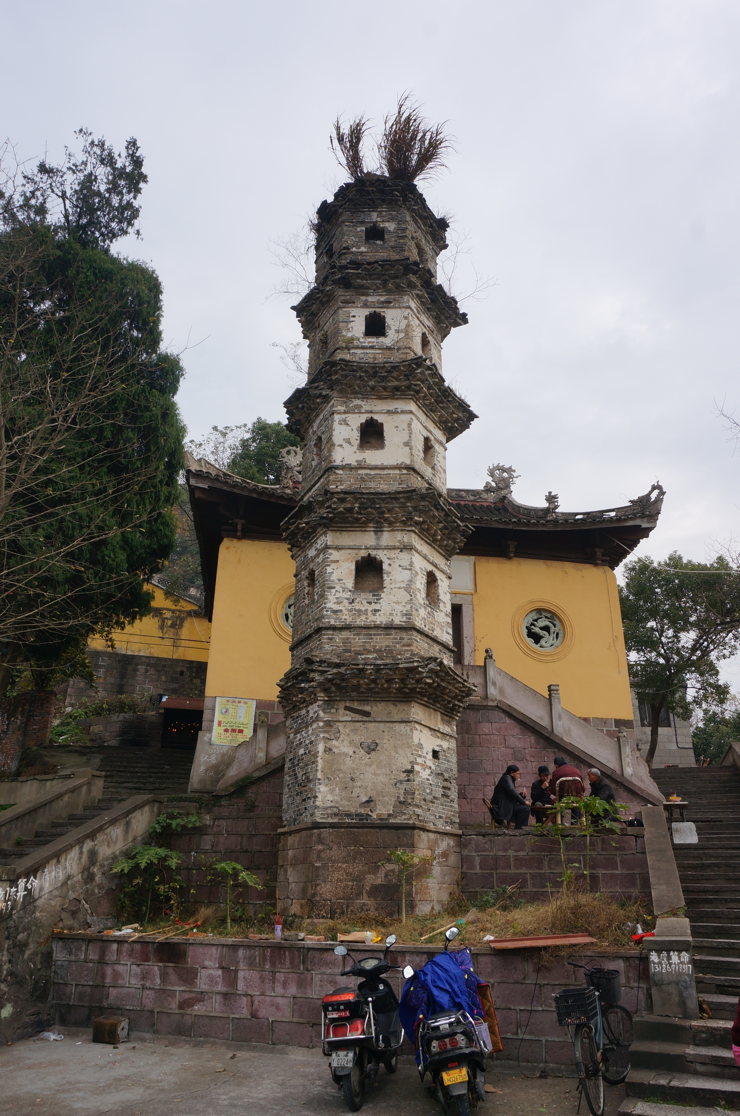 台州巾山南山殿塔，西南面。